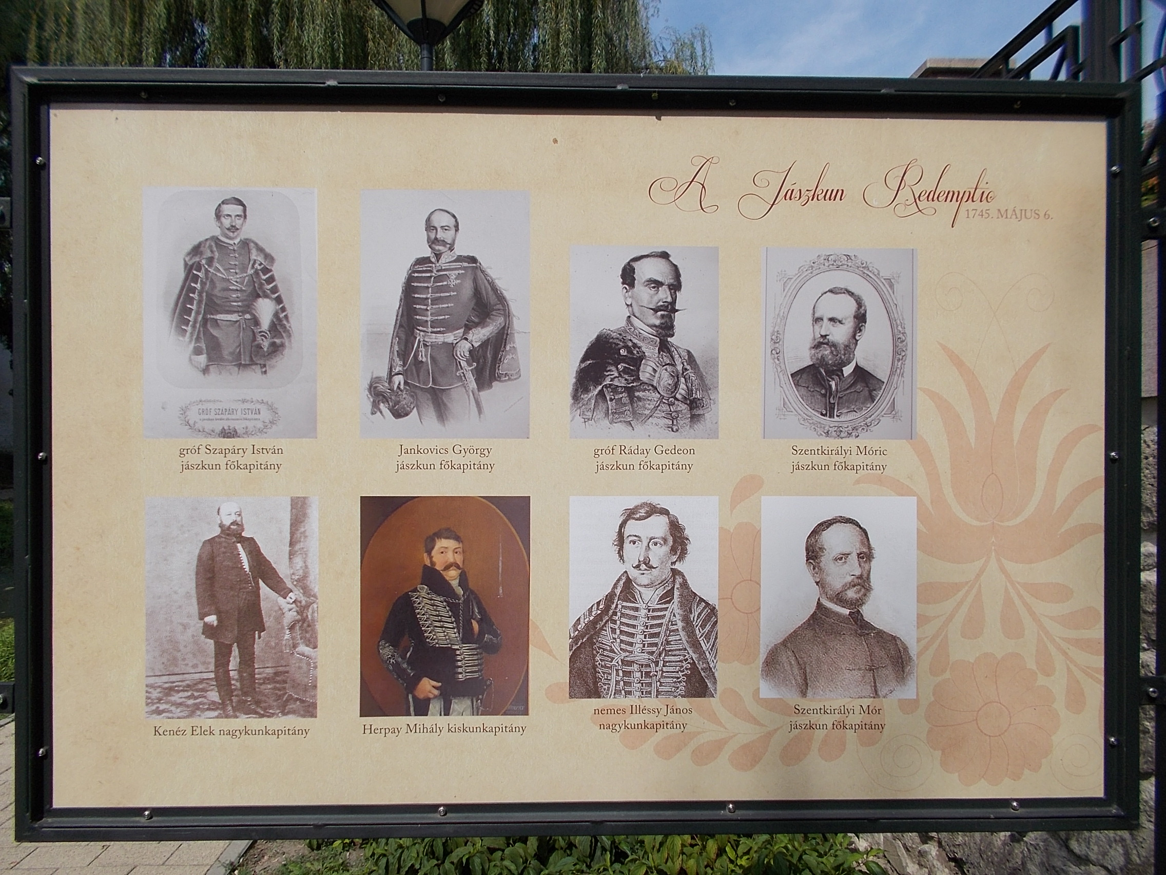 A Jászkun Redemptio. Szabadtéri kiállítás. Politikusok. - Jászberény, Zagyva sétány